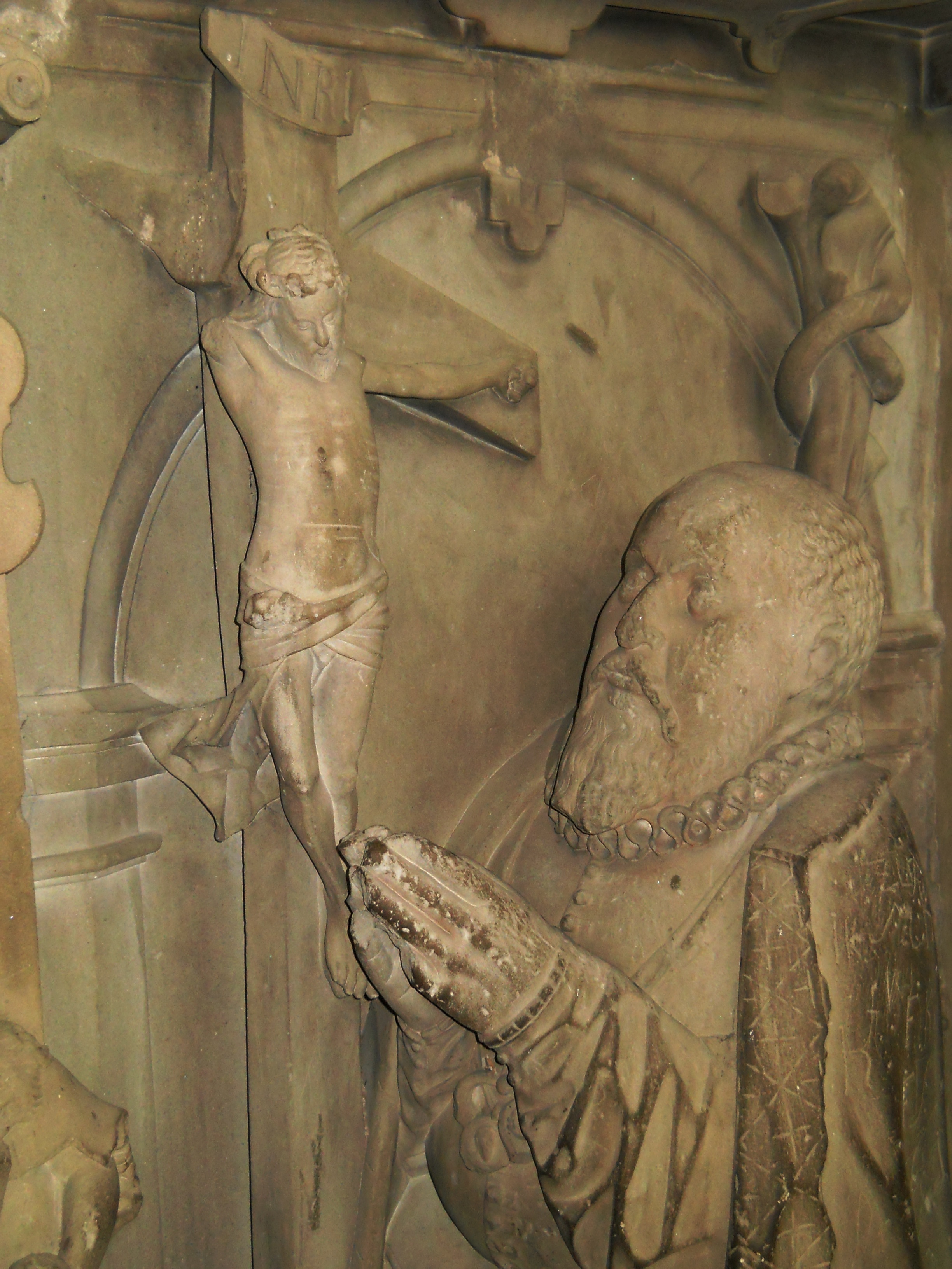 Kirchehrenbach in der Fränkischen Schweiz, Kath. Pfarrkirche St. Bartholomäus, Renaissance-Denkmal für Sigmund von Wiesenthau, Abt des Benediktinerklosters Banz